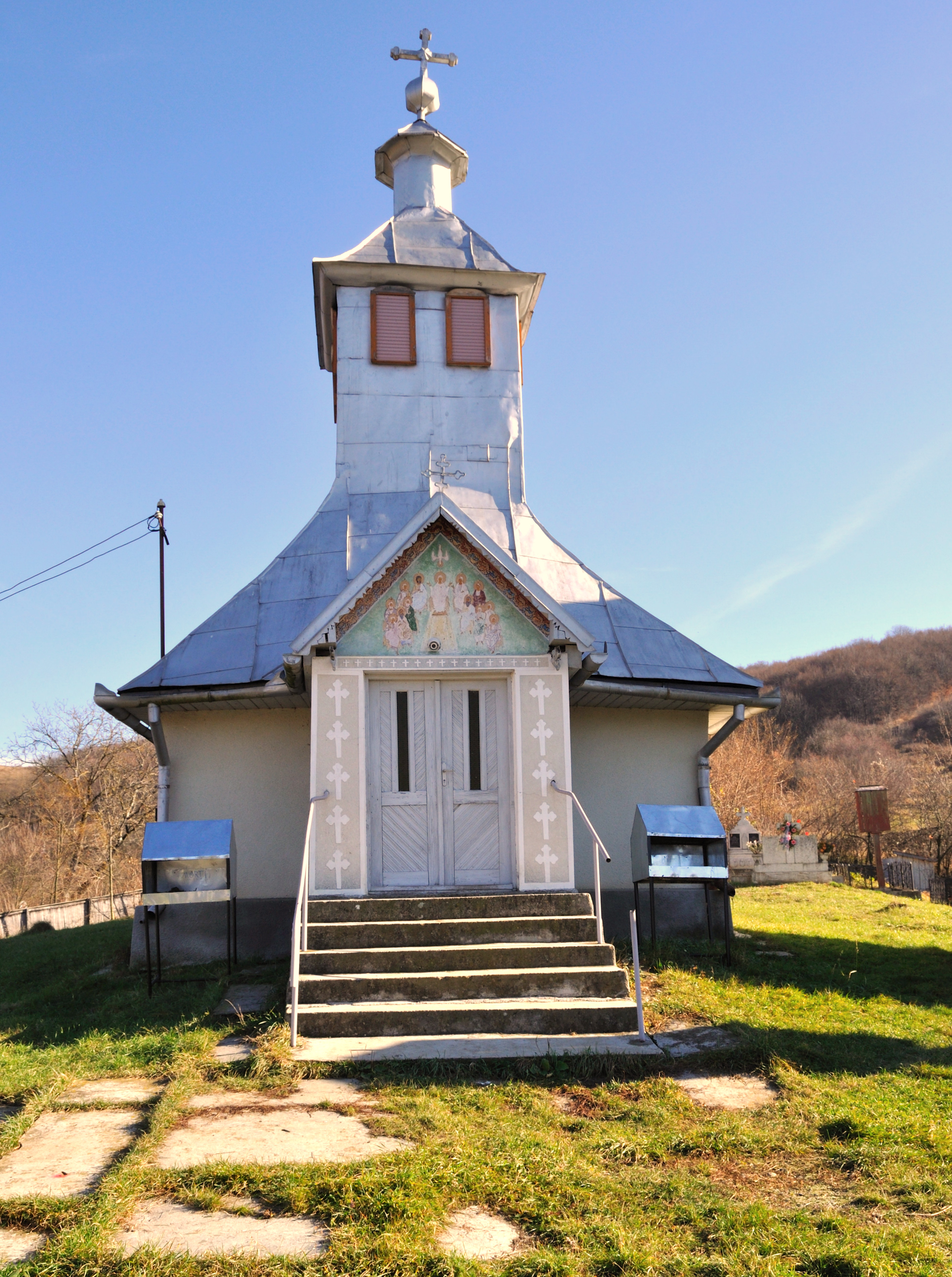 Biserica de lemn din Țăgșor, Bistrița-Năsăud